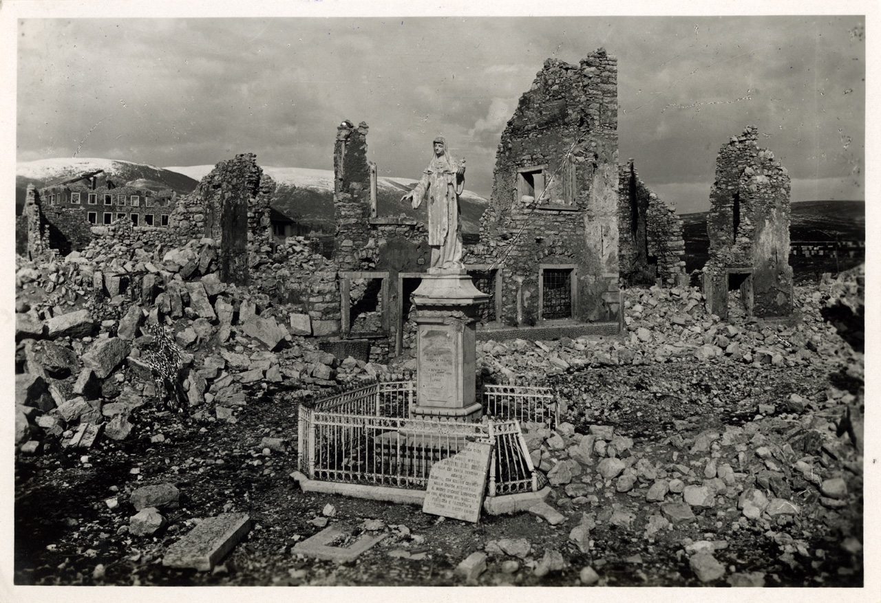 Asiago. Monumento della beata Giovanna Maria Bonomo intatto tra le macerie